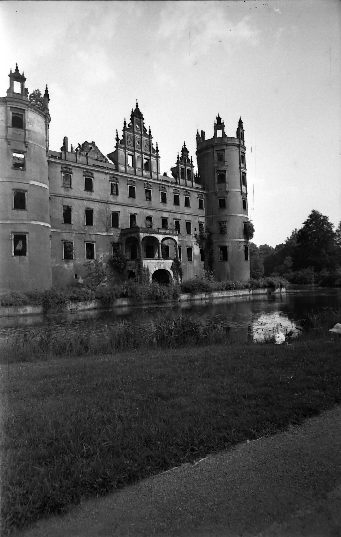 Ruine des Neuen Schlosses Bad Muskau, wahrscheinlich in den 1980er Jahren, Westfassade